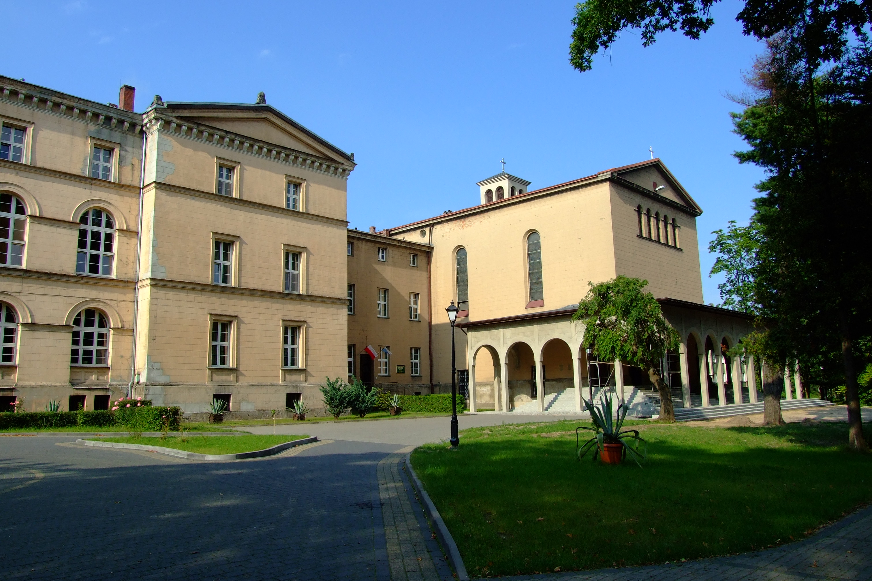 Klasztor Ojców Oblatów i kościół św. Stanisława Kostki w Lublińcu